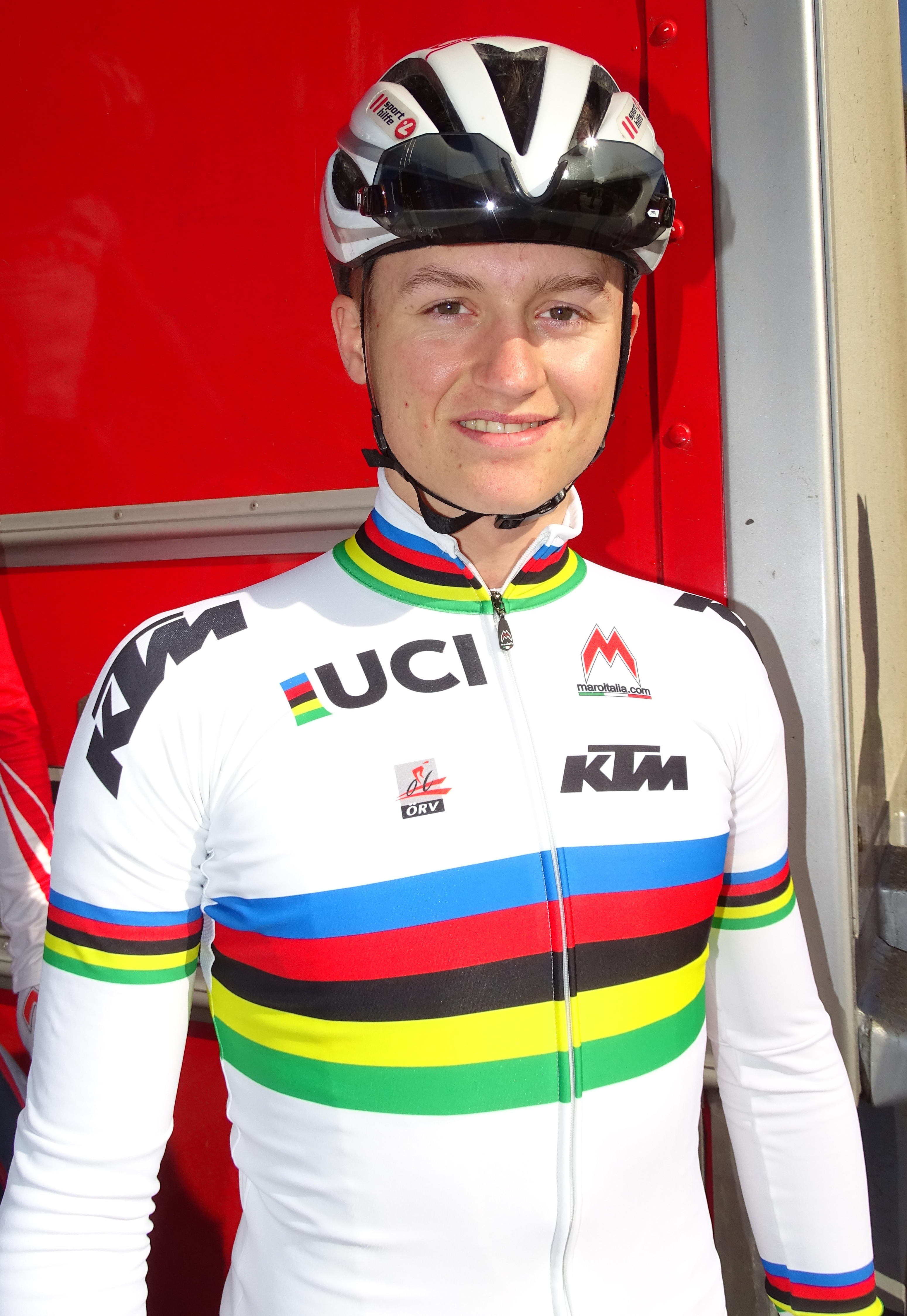 Reportage réalisé le dimanche 10 avril à l'occasion du départ du Paris-Roubaix juniors 2016 à Saint-Amand-les-Eaux, France.